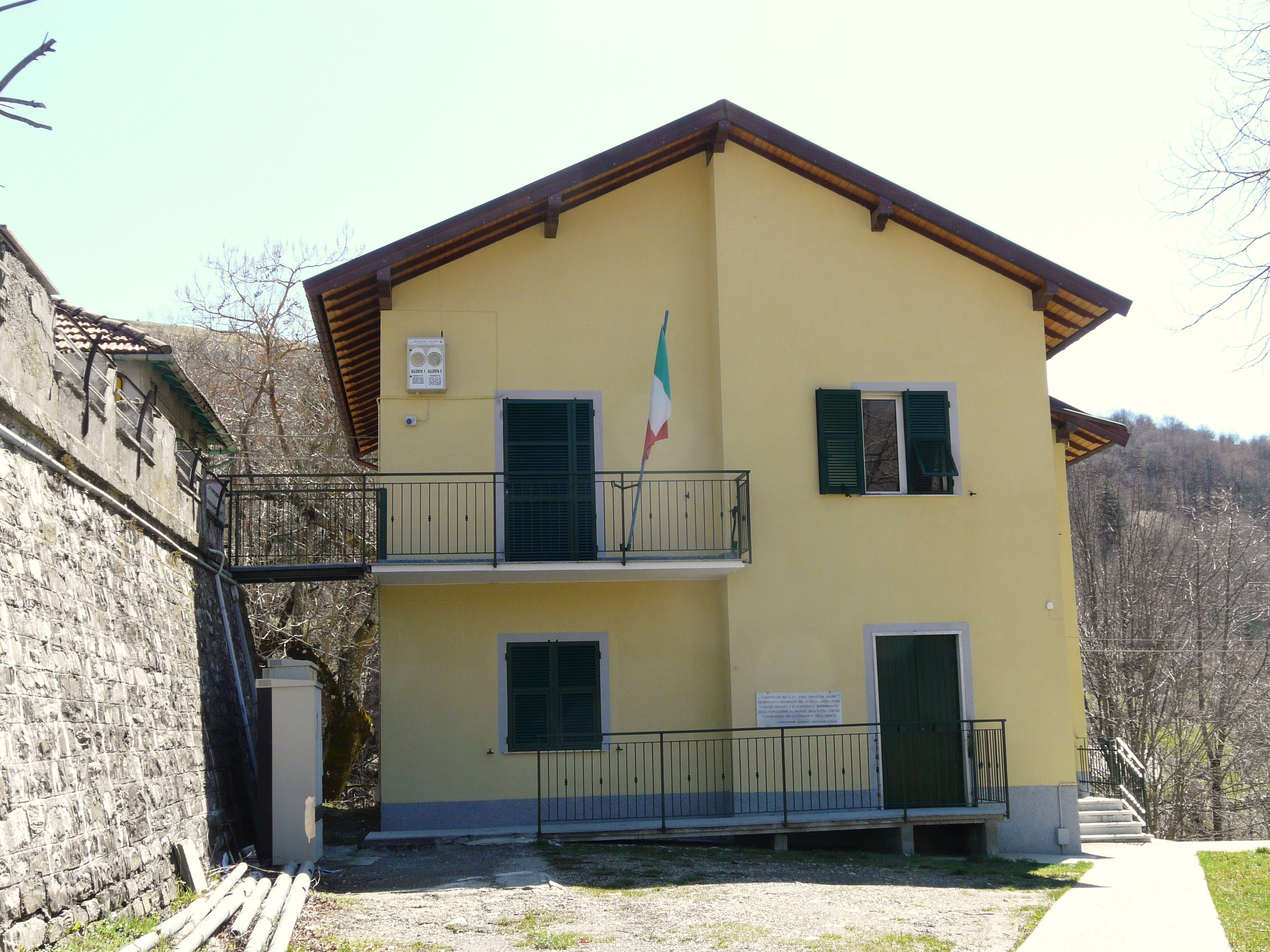 Municipio, Propata, Liguria, Italia